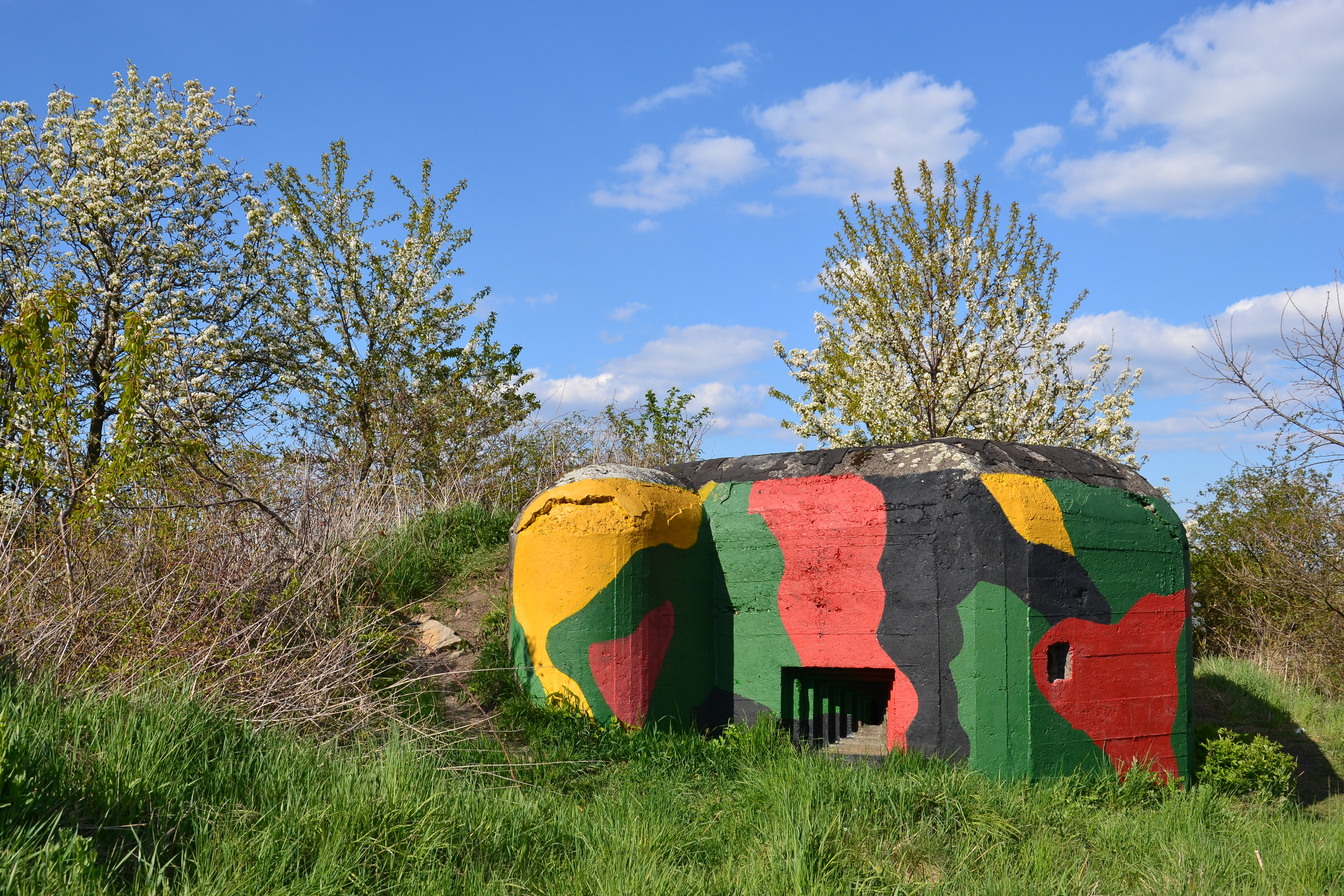 Objekt K-51/22/A-160Z